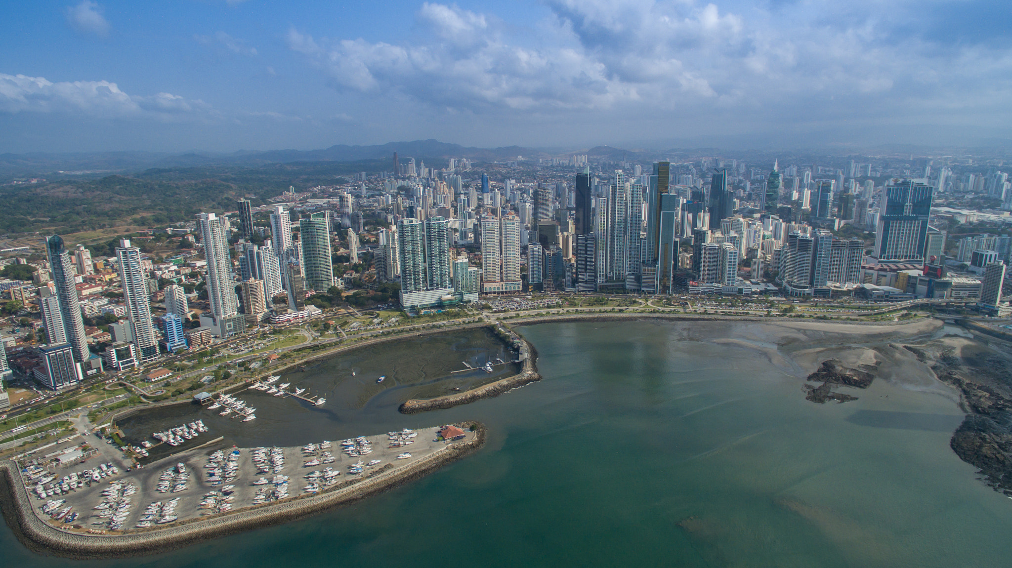 500px provided description: Panama-Stadt mit ca. 1,5 Millionen Einwohnern ist die Hauptstadt und der Regierungssitz des mittelamerikanischen Staates Panama. [#city ,#architecture ,#panama ,#aerial ,#photo ,#sight ,#travelling ,#holiday ,#skyscrapper ,#architektur ,#papers ,#pa ,#stadt ,#urlaub ,#reisen ,#sehensw?rdigkeit ,#luftbild ,#panamacity ,#panam? ,#aerialphotography ,#luftbildaufnahme ,#allgemein ,#panamapapers ,#panamastadt ,#panamap]